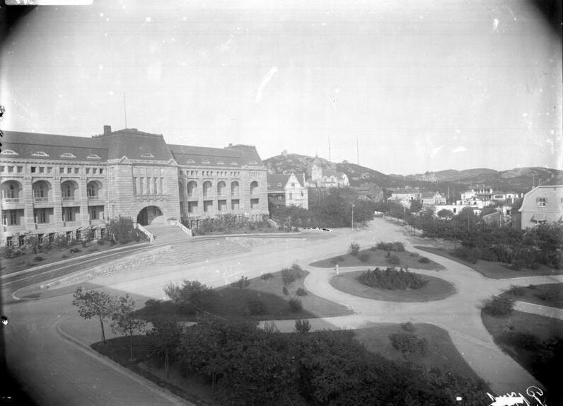 Schutzgebiet Kiautschou Tsingtau : Der Sitz des Gouverneurs